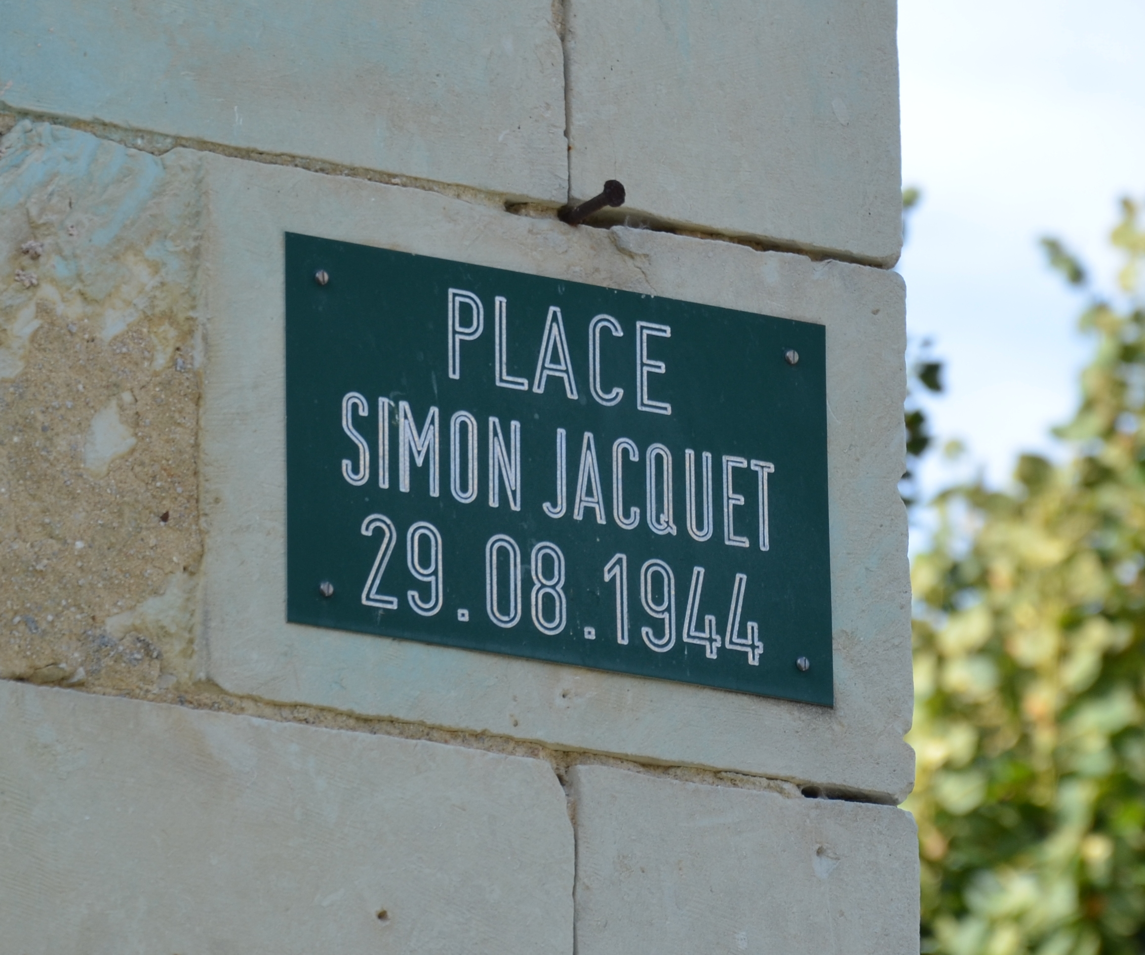 Plaque de la place Simon Jacquet à Boussay (Indre-et-Loire, France).